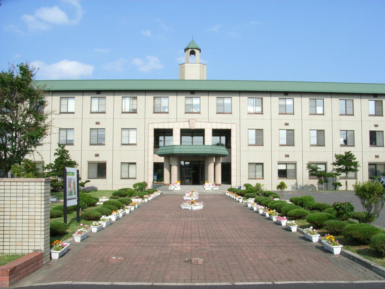 名寄市立大学および短期大学部（旧名寄市立名寄短期大学）本部校舎正面